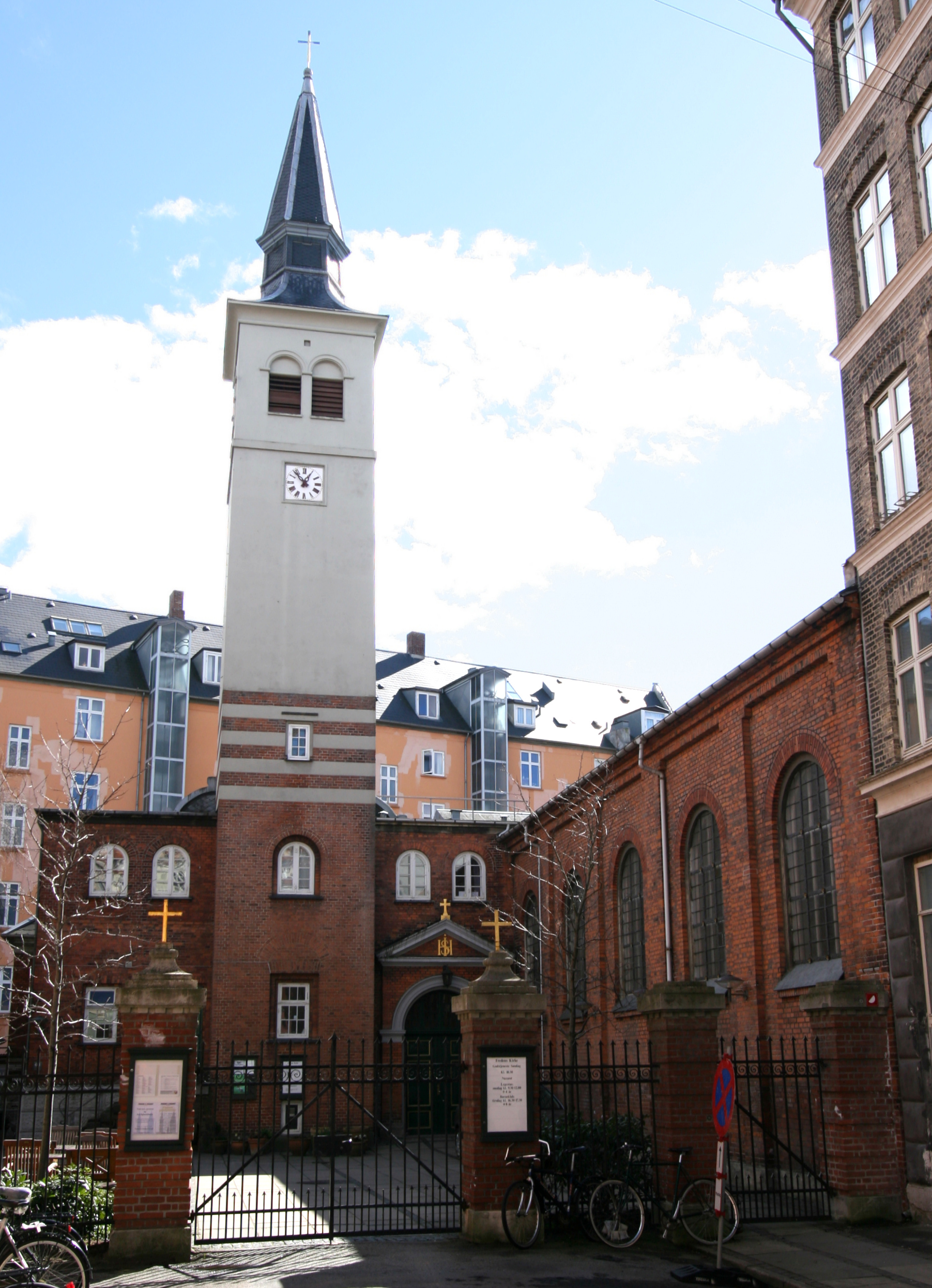 Fredens Kirke, Østerbro, Denmark. Fredens Kirke